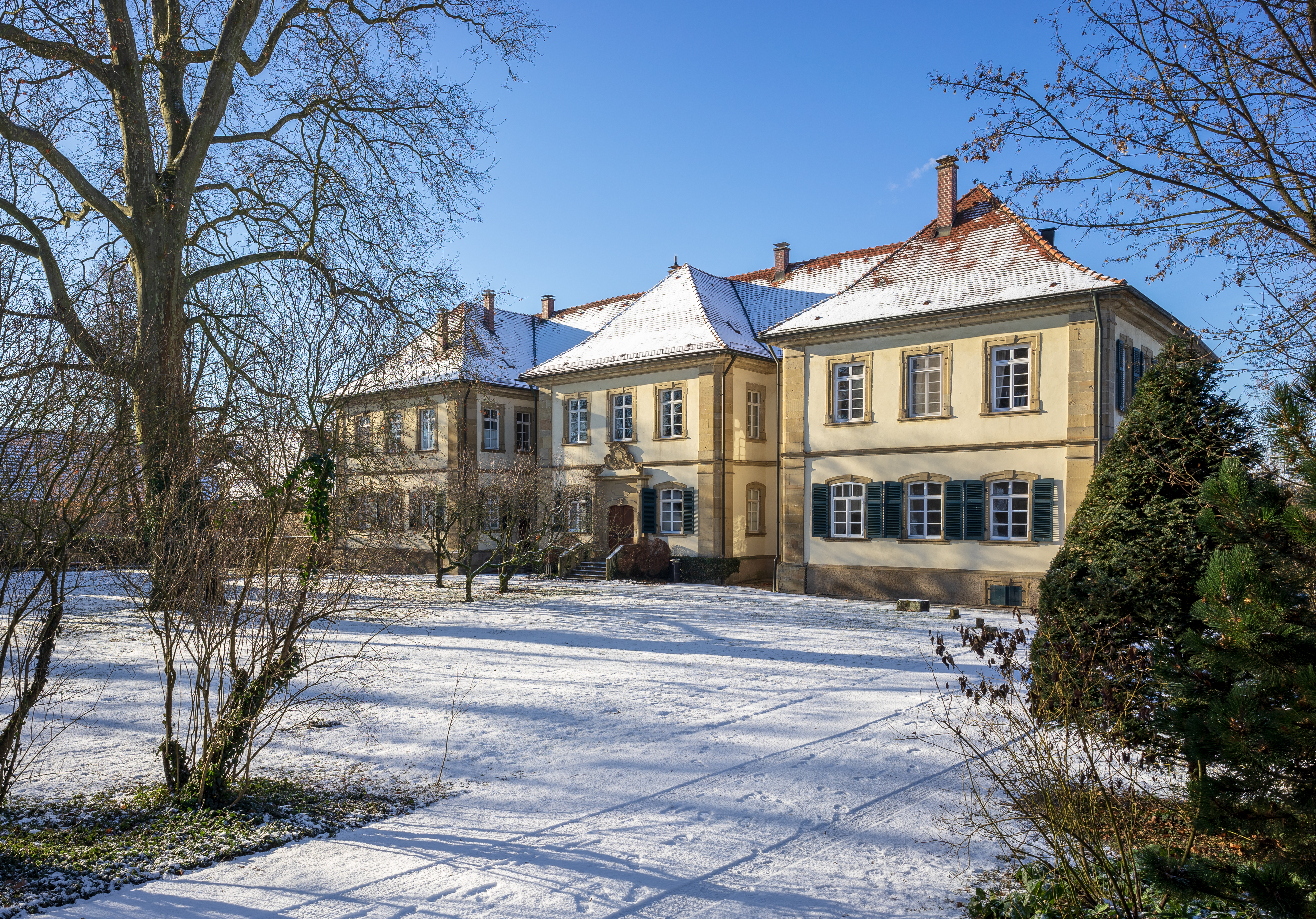 Bad Rappenau, Ortsteil Bonfeld: Ansicht der Ostfassade des Oberschlosses an einem strahlenden Wintertag mit Schnee, gesehen von Ost-Nordosten. Wegen des Baumbestandes im Ostgarten ist es leider praktisch unmöglich, die Ostfassade ganz ohne störendes Astwerk im Bild zu fotografieren; dies ist eine der besten Näherungen.